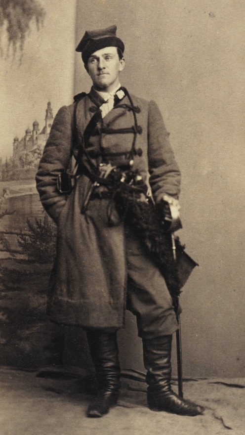 Józef Miniewski